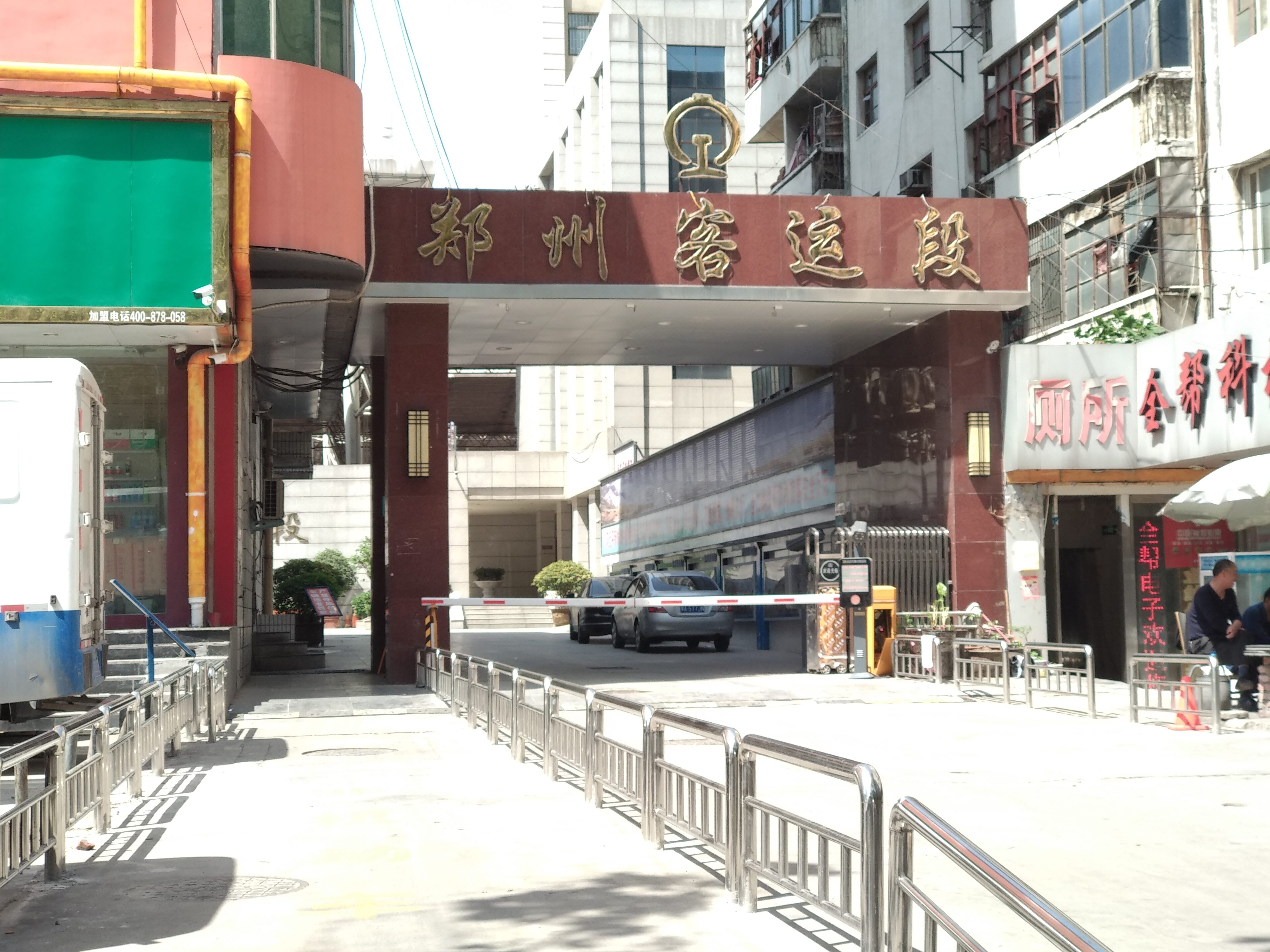 郑州铁路局郑州客运段大门